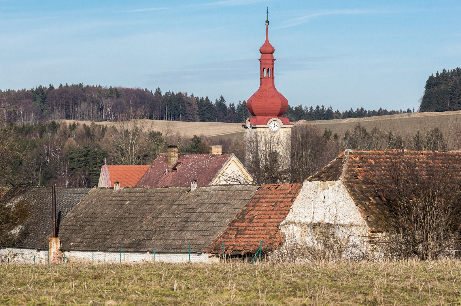 Smilovy Hory v lednu 2014